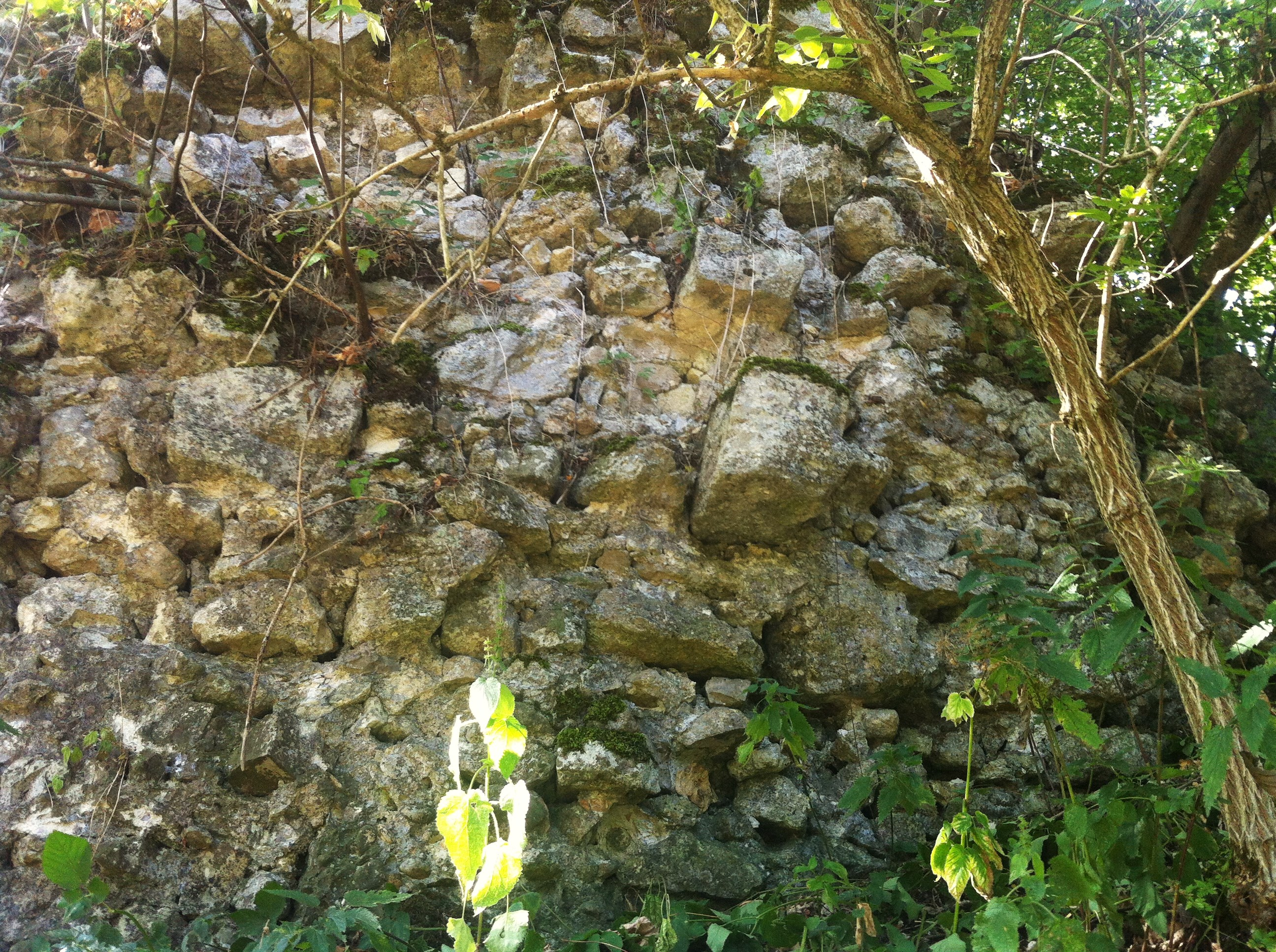 Geschichte der Stadt Blumberg im Schwarzwald-Baar-Kreis. Futtermauer des Halsgrabens (nordwestlich) zwischen Burg und Dorf (Vorburg).